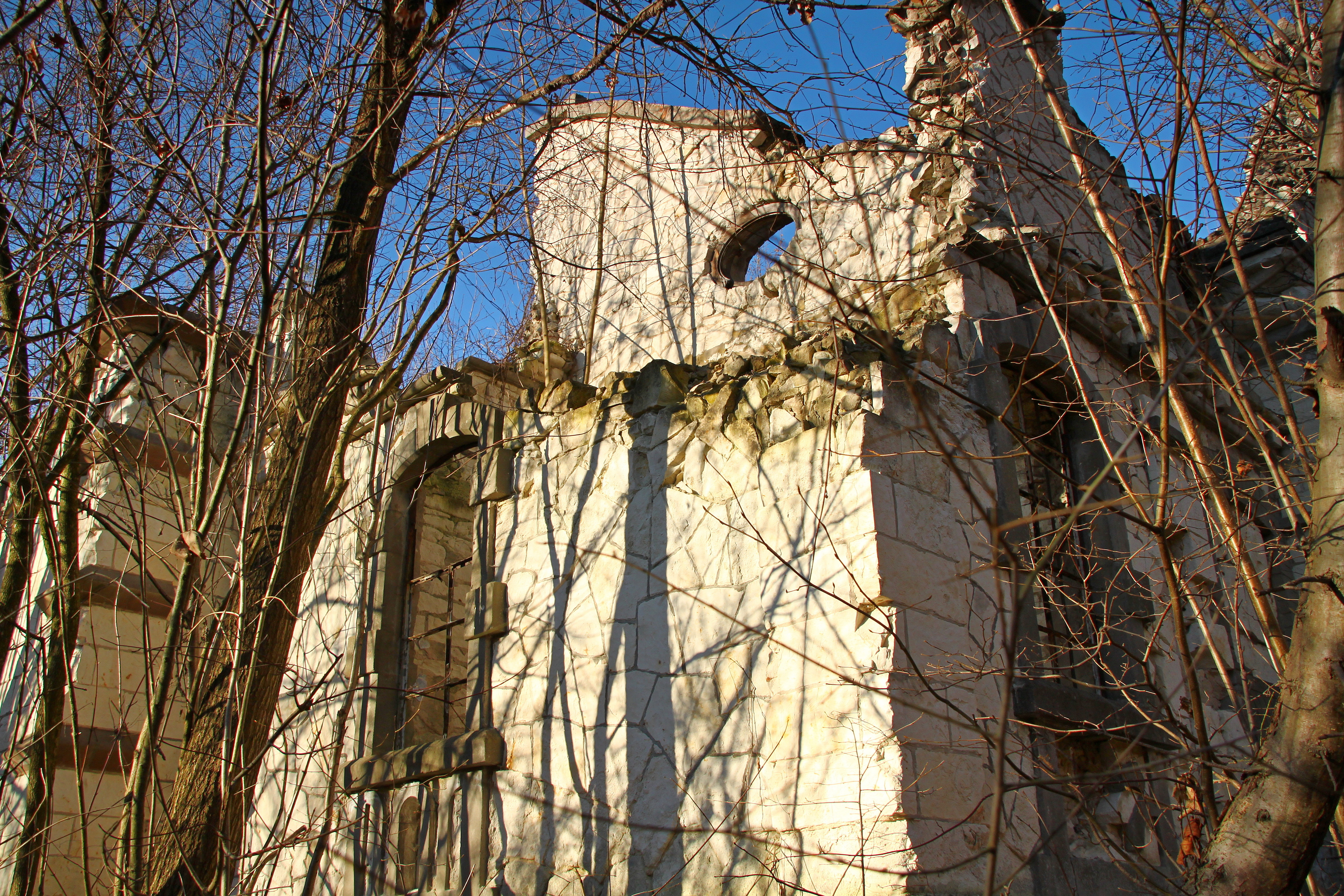 Kazimierz Dolny, ul. Albrechtówka - willa Szukalskiego (ruina) (z ogrodem ?), 1914